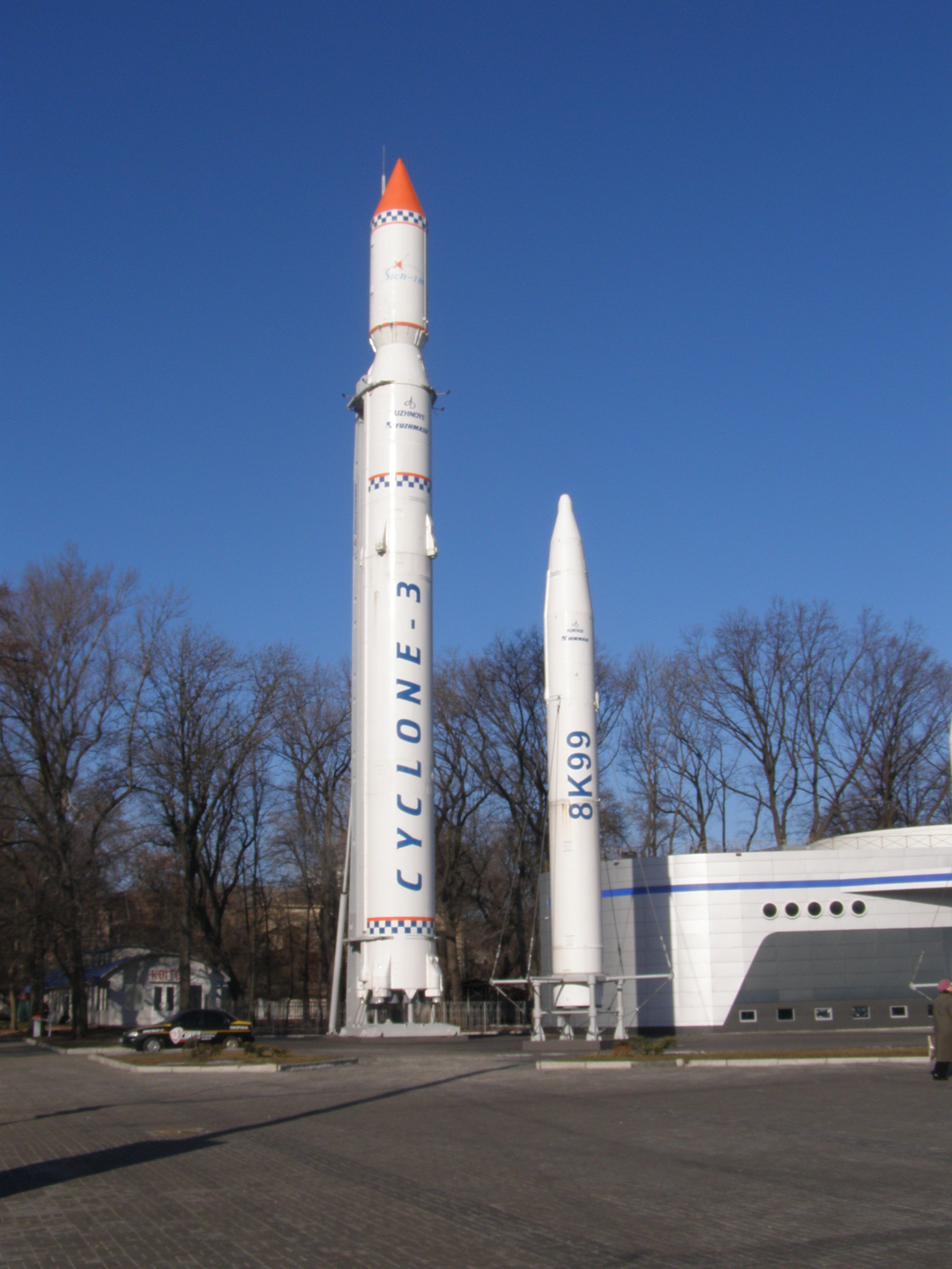 Центр інноваційних технологій «Парк ракет» в Дніпропетровську. Макети ракет «Циклон-3» і 8К99.